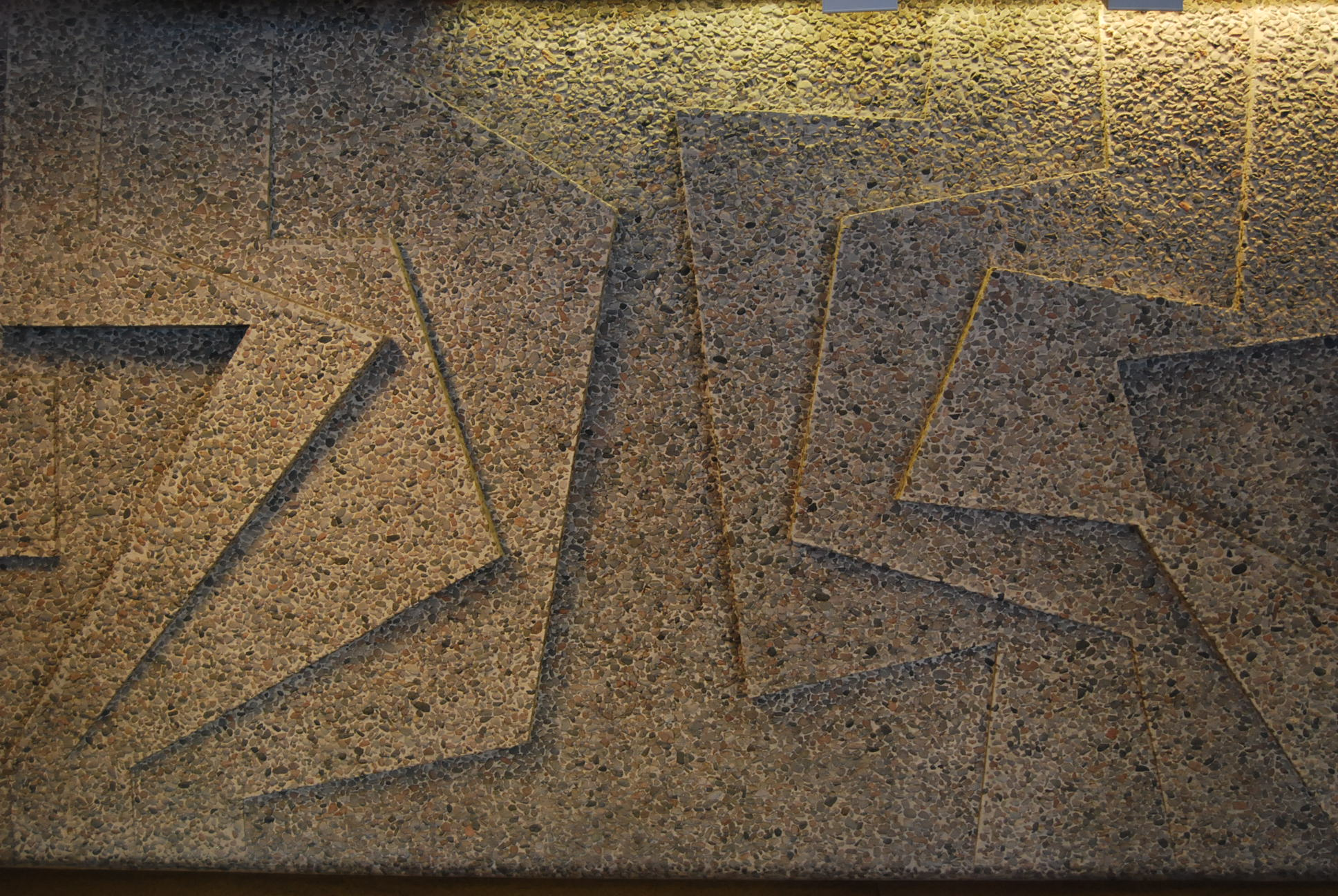 Odd Tandberg brukte sandblåst naturbetong når han smykket NVE-huset. Her er del av bakveggen i rotunden i første etasje. Som man kan se av lyset er veggen utformet i relief. Dato: 23.02.2009